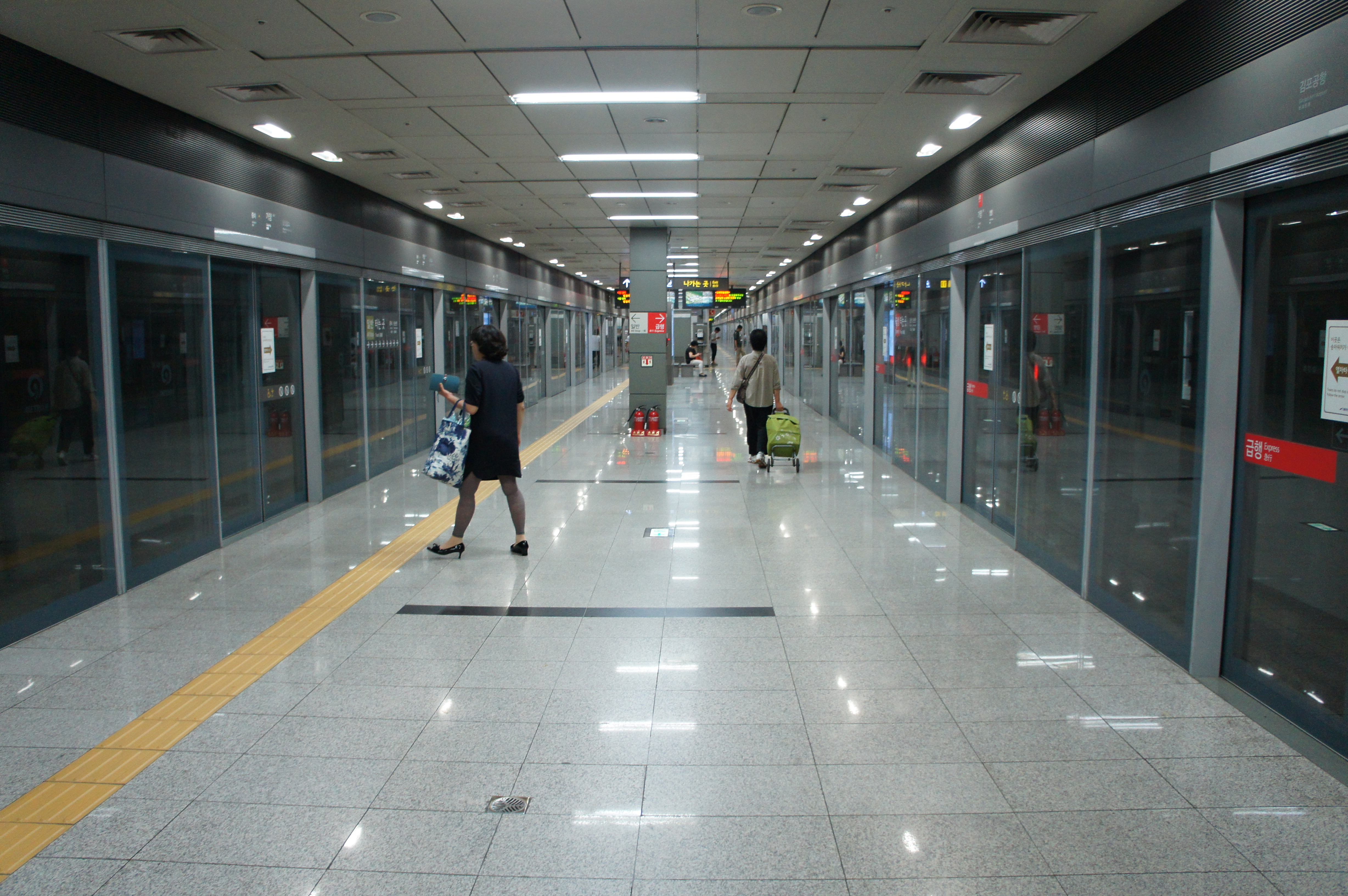 가양역 승강장